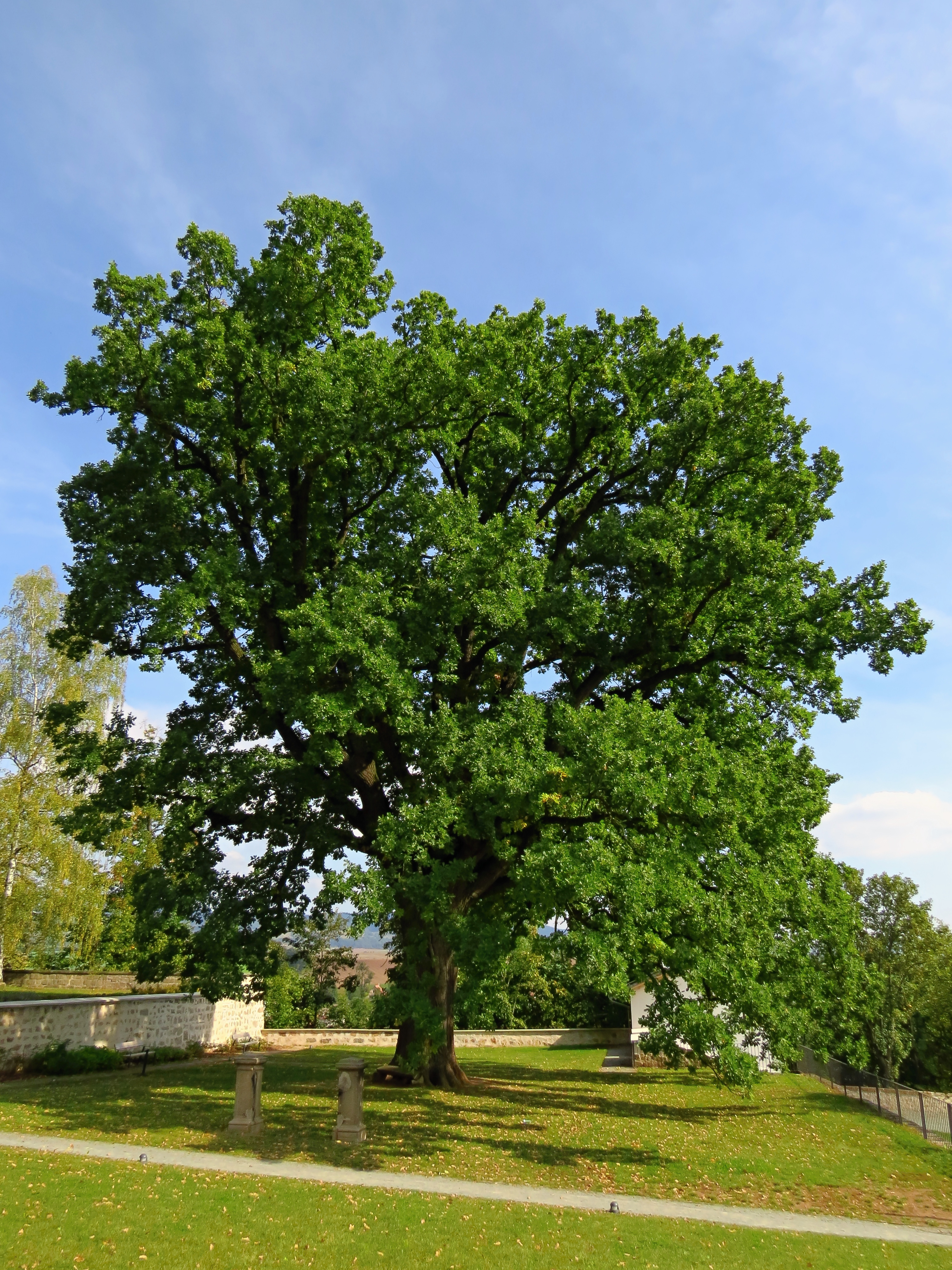 Dub letní (Quercus robur) v zahradě broumovského kláštera